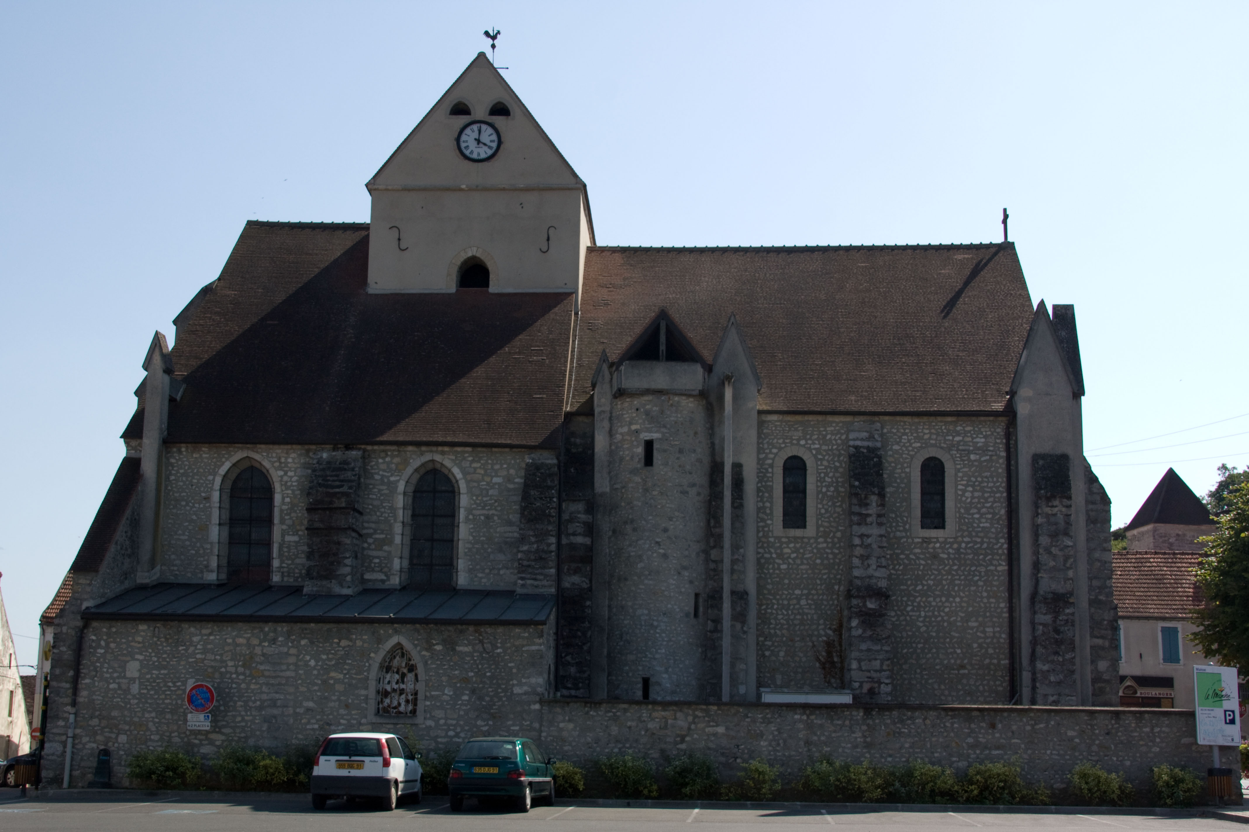 Eglise de Maisse, Maisse, Essonne, France